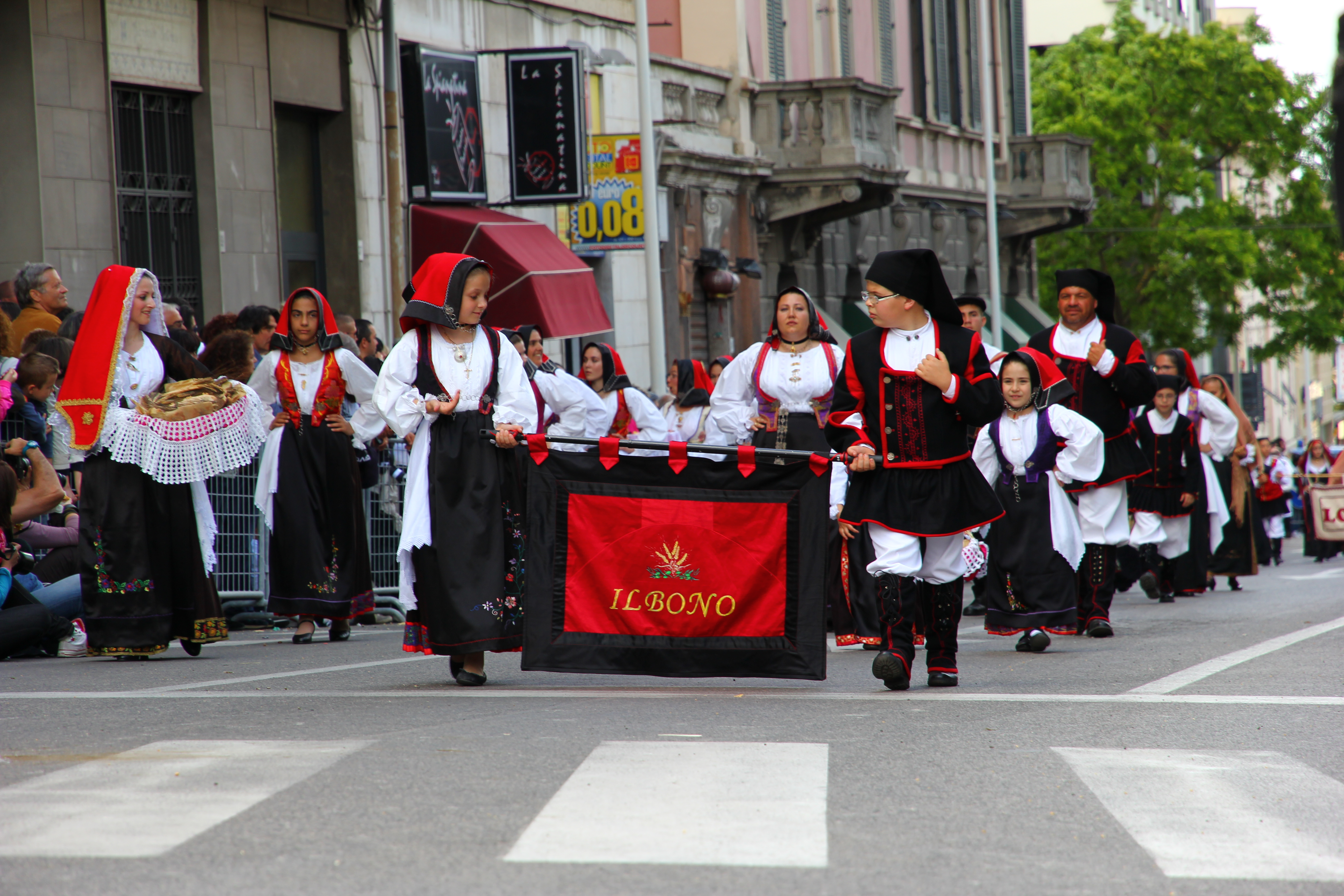 Cavalcata Sarda 2013 (Sassari)